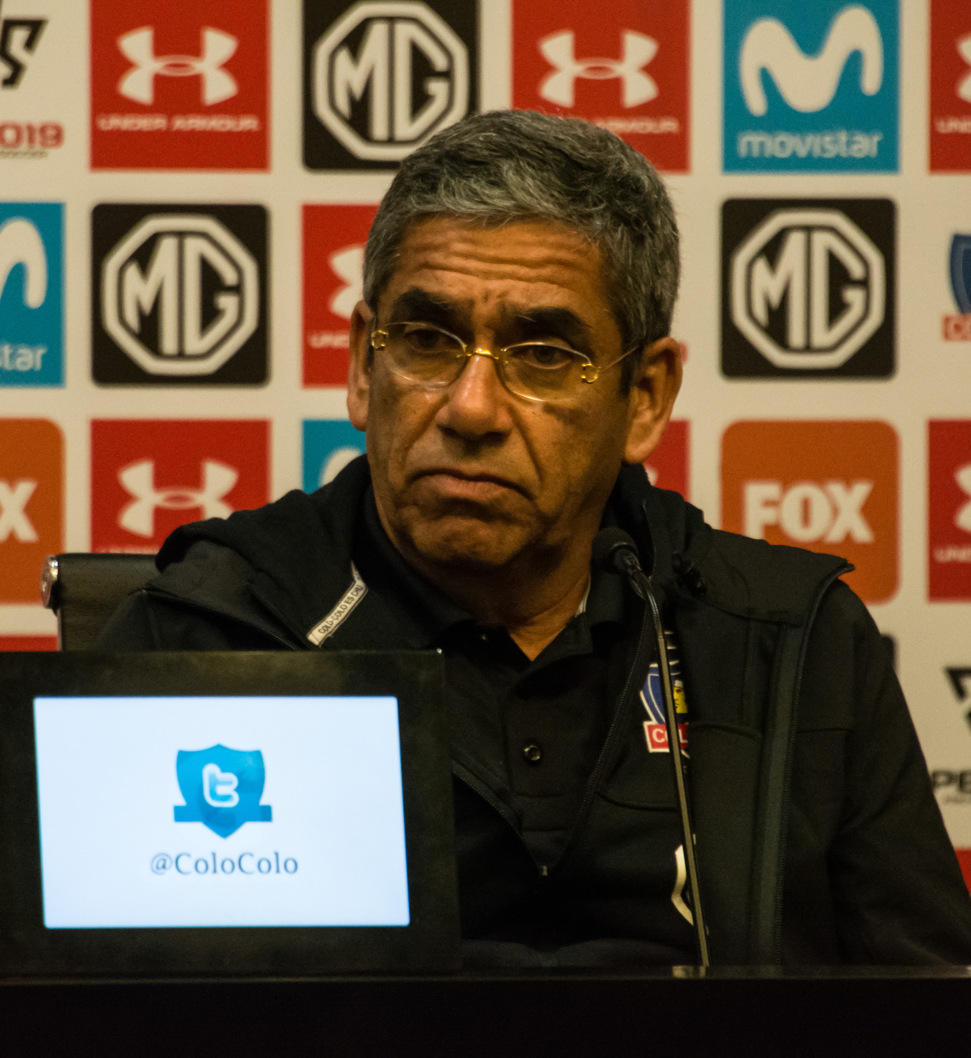 Gualberto Jara, Colo-Colo v San Luis, Estadio Monumental, Macul, Santiago, Chile.